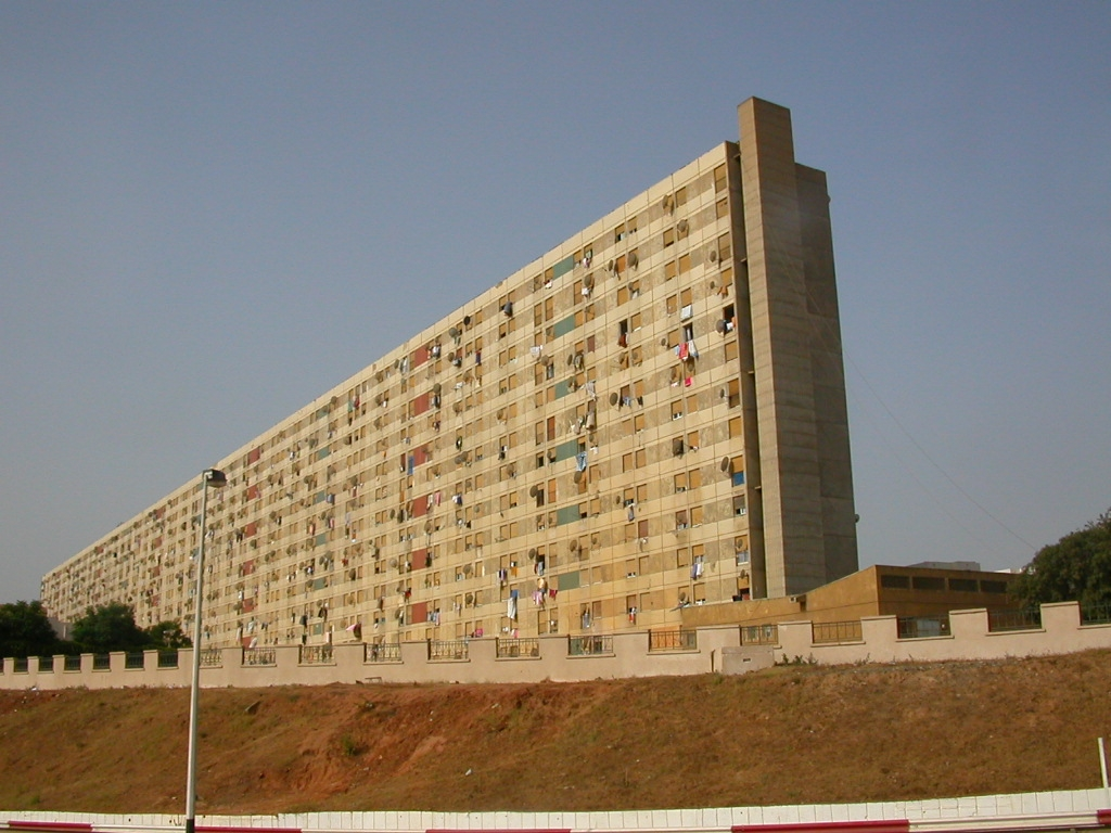 Photo de l'un des deux batiments des Dunes (à Alger ?)